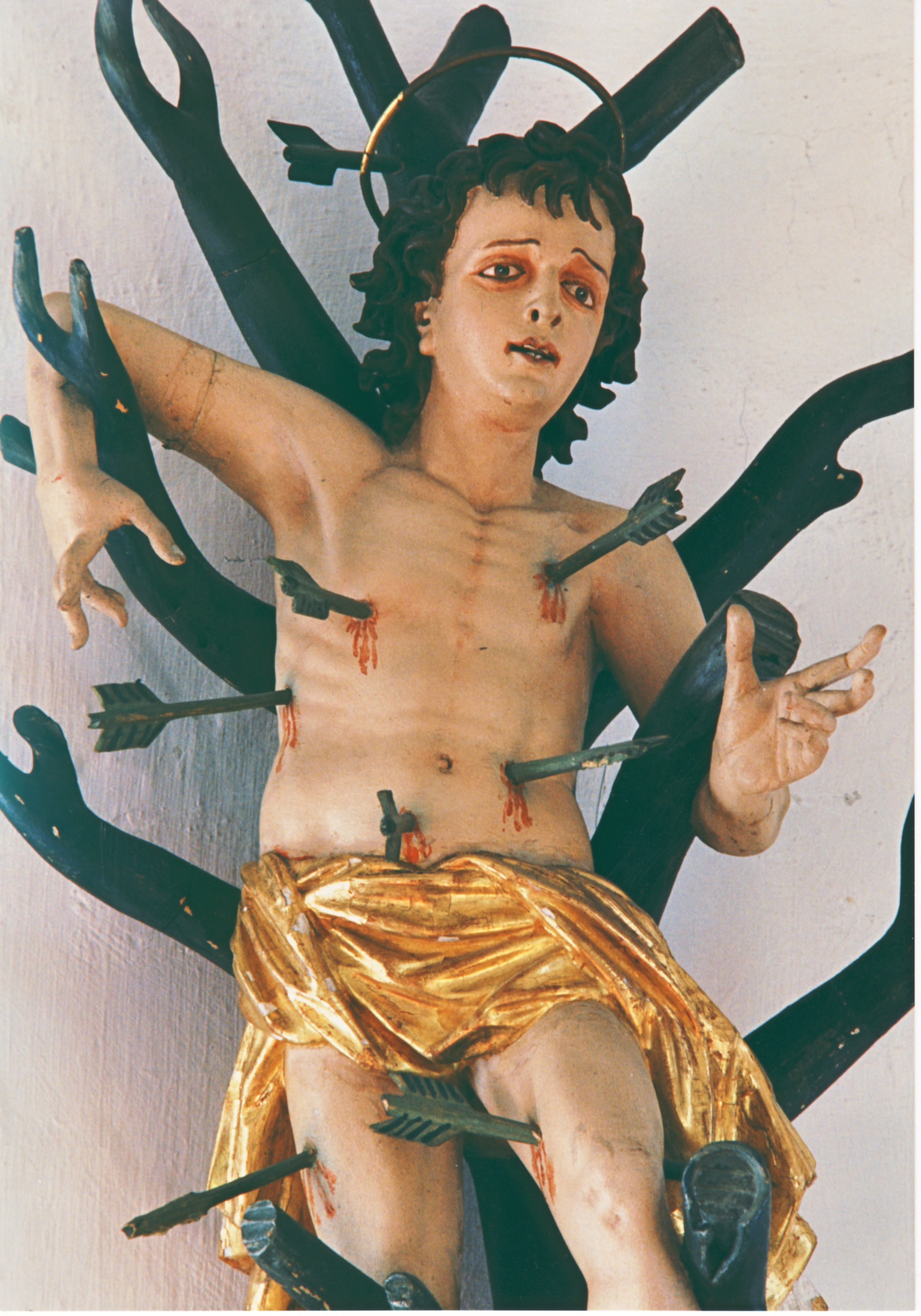 Figur des Hl. Sebastian in der Kapelle St. Sebastian in Pfronten-Weißbach